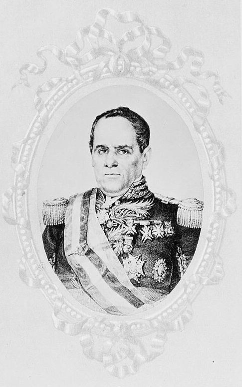 General Antonio Lopez de Santa Anna